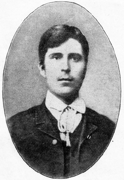 Иван Проханов в юности